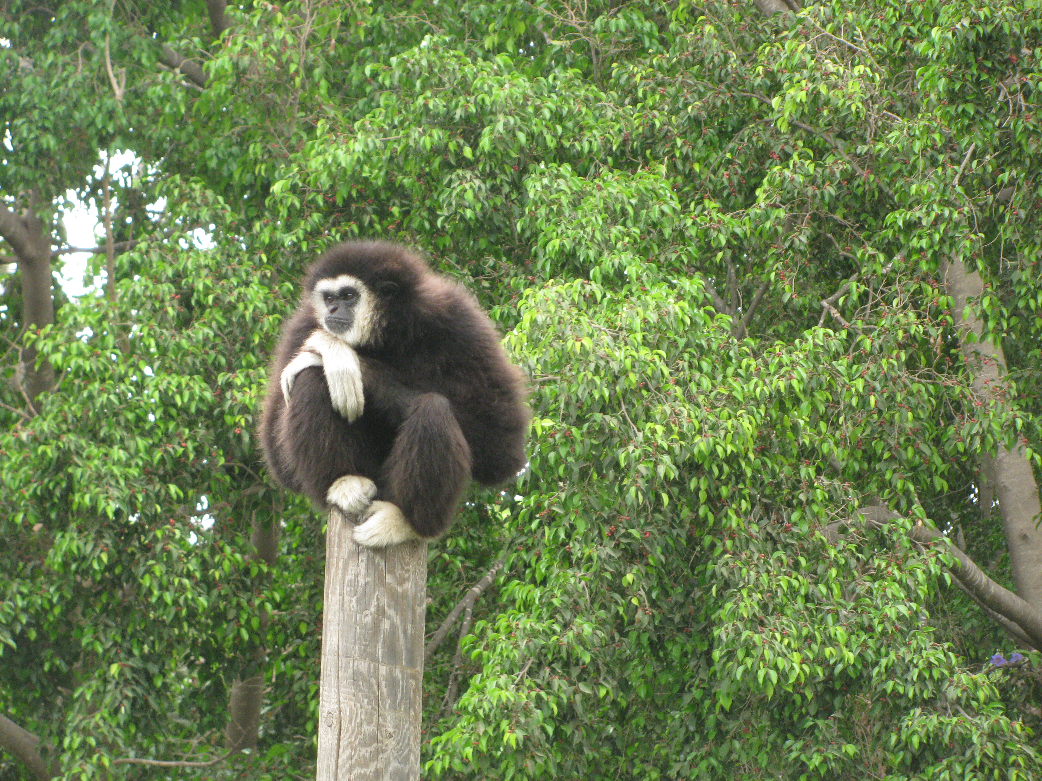 גיבון לבן יד בספארי של רמת גן